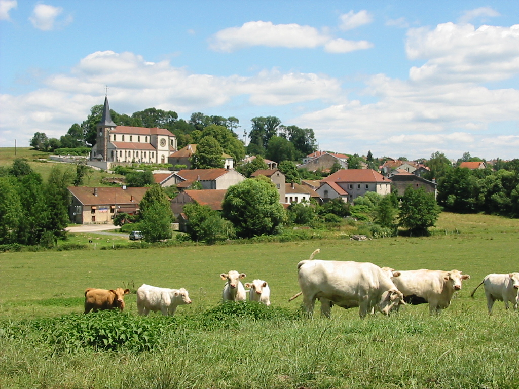 Grandvillers, Commune du canton de Bruyères (Vosges)